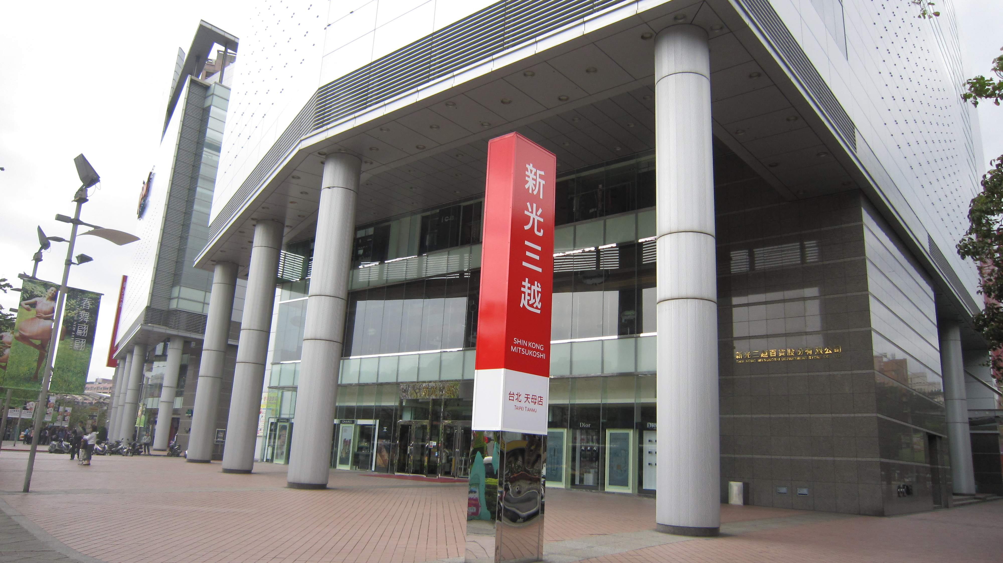 新光三越百貨台北天母店 111台北市士林區天母東路68號 02-2875-6000